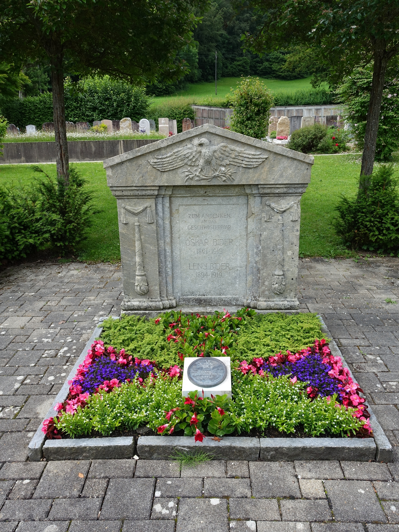 Oskar Bider (1891–1919) Flugpionier. Leny, Julie Helene Bider (1894–1919) Stummfilm-Schauspielerin. Grab auf dem Friedhof von Langenbruck, Basel-Land, Schweiz.